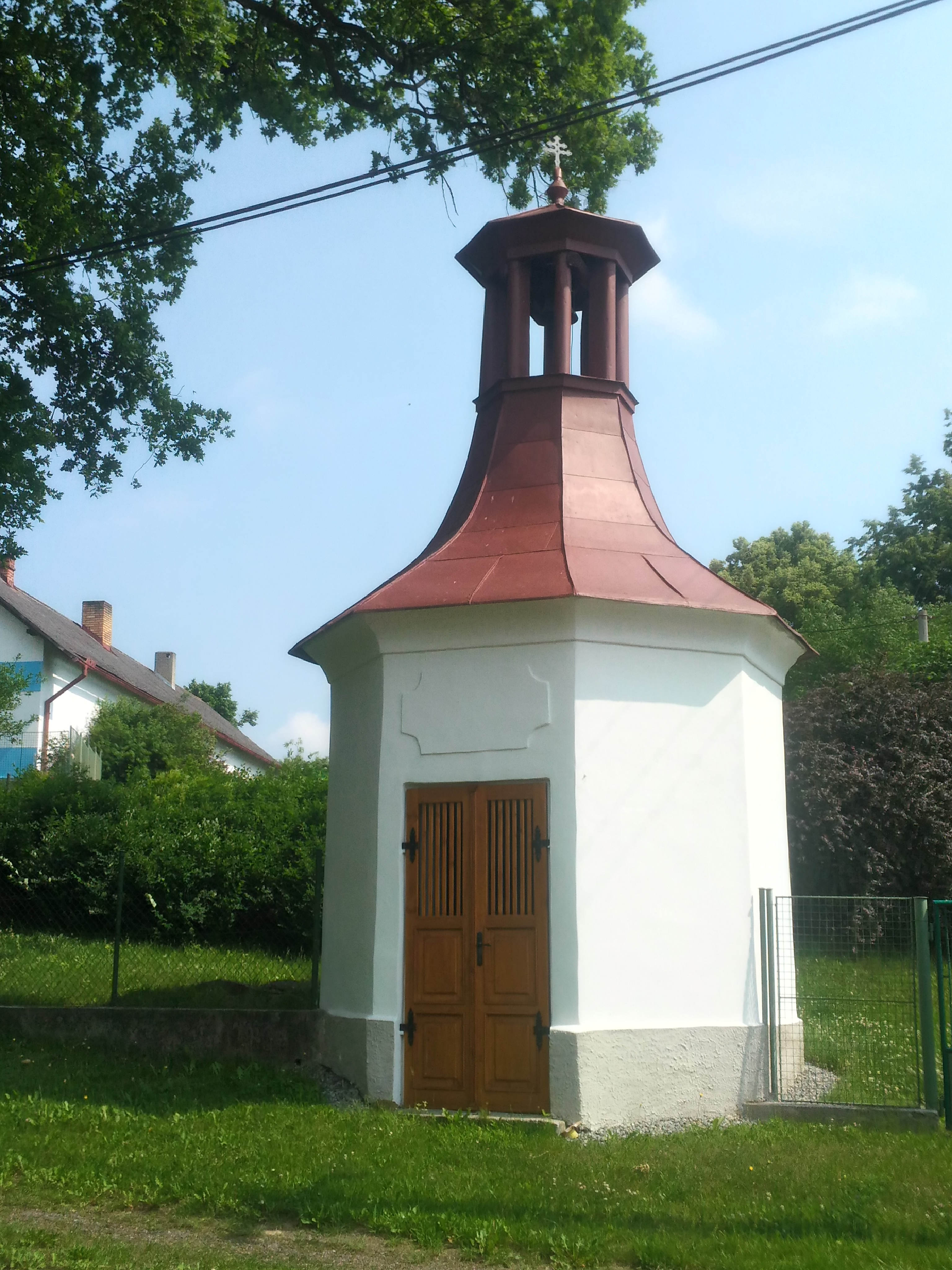 Liderovice, okres Tábor, Česká republika